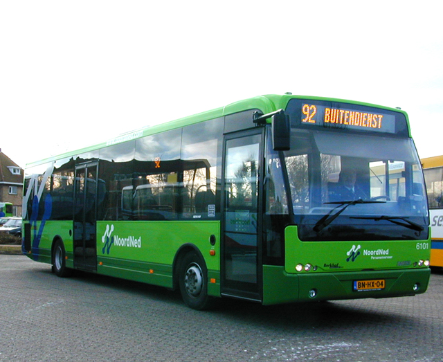 NoordNed bus 6101 van het type Berkhof Ambassador ALE 120 te Station Sneek.